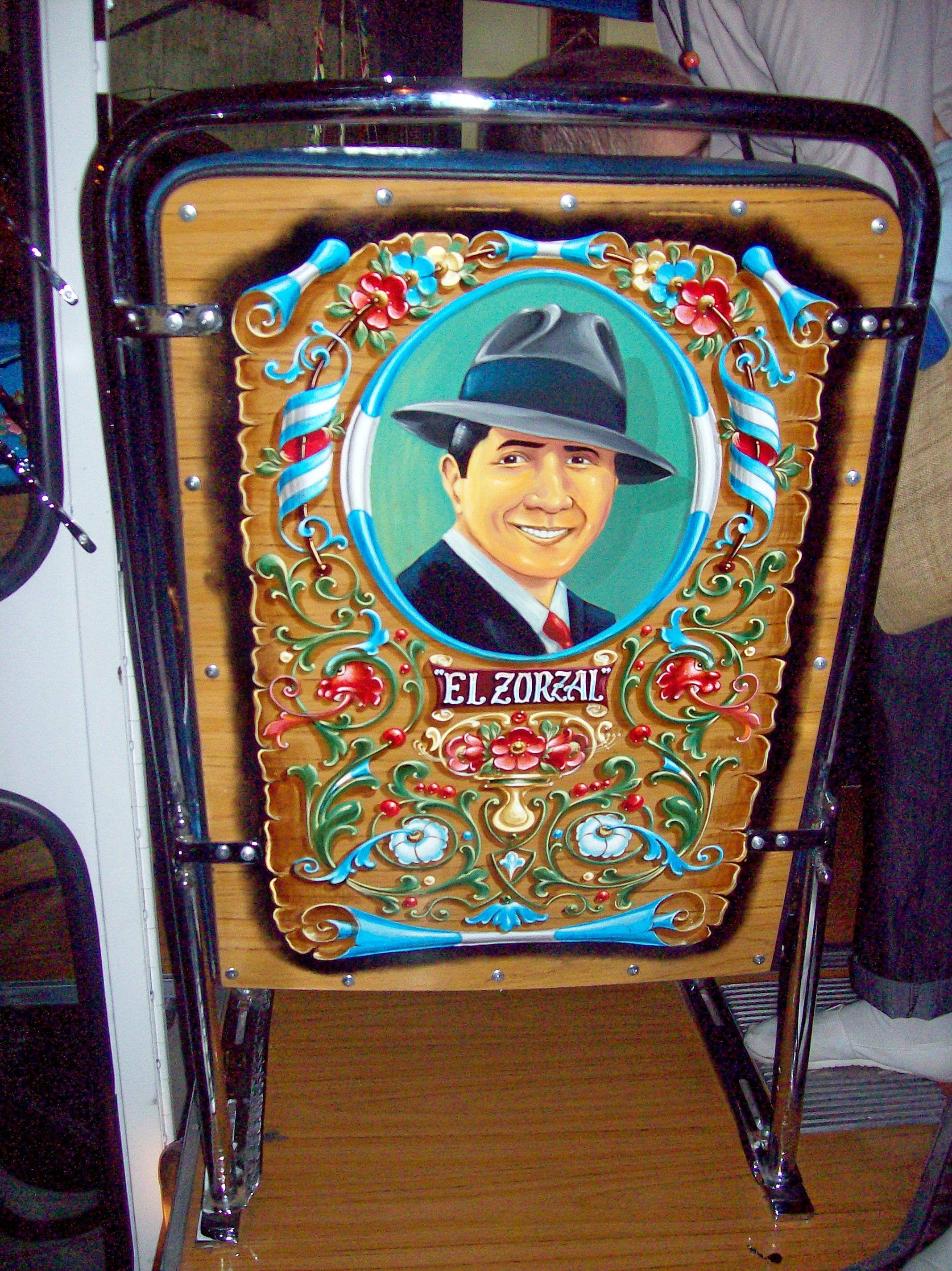 Parte trasera del asiento del conductor en un viejo Colectivo, fileteado con imagen de Carlos Gardel. Buenos Aires, Argentina.